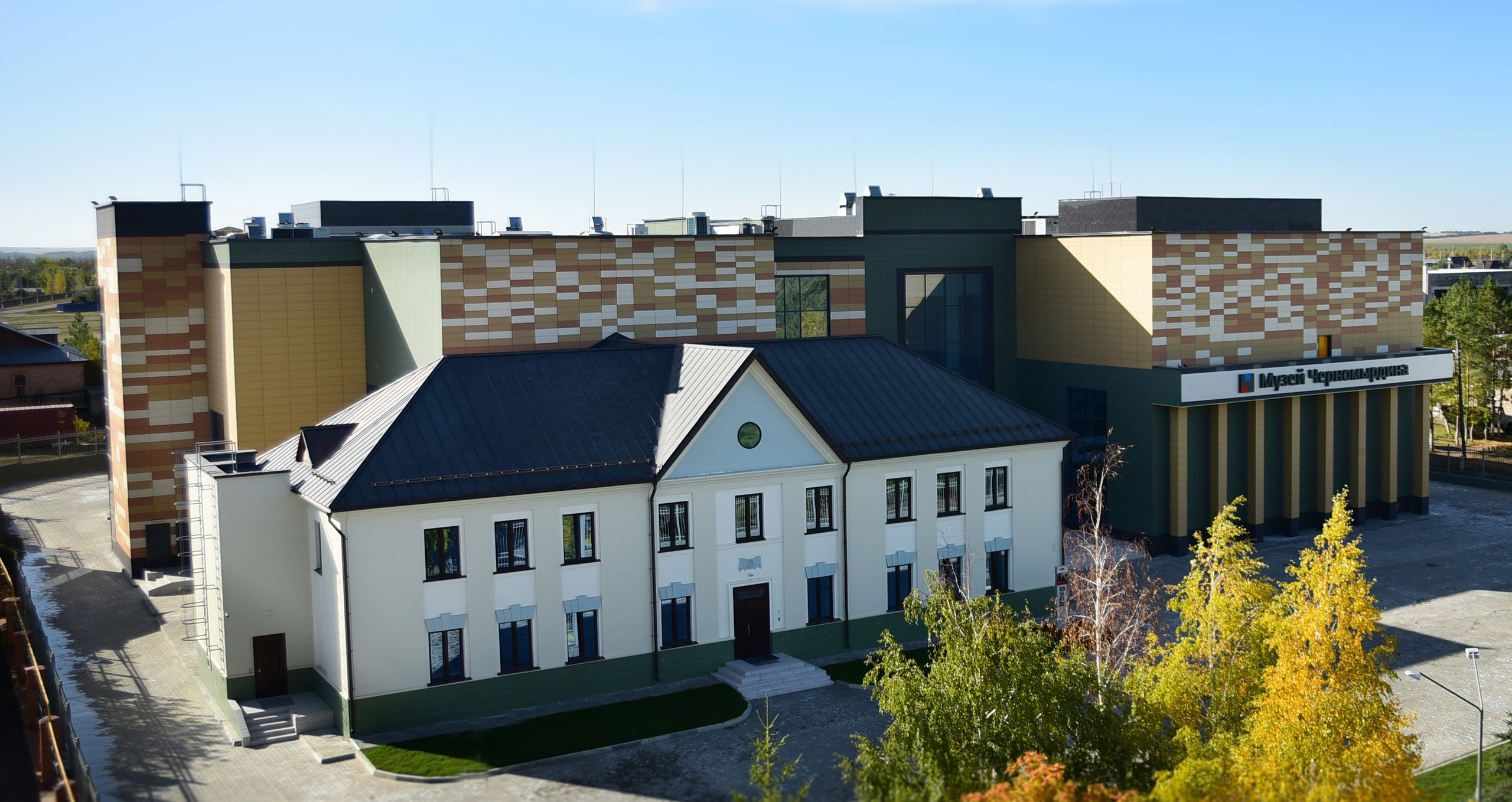 Музей Черномырдина, вид с колокольни храма. Июнь, 2020 год.